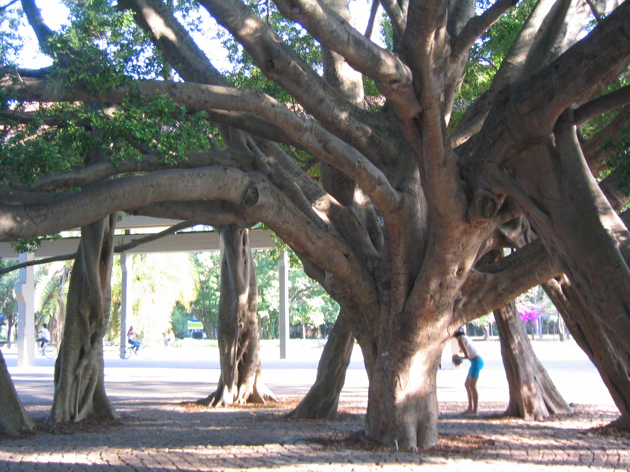 Feigenäume im Parque do Ibirapuera